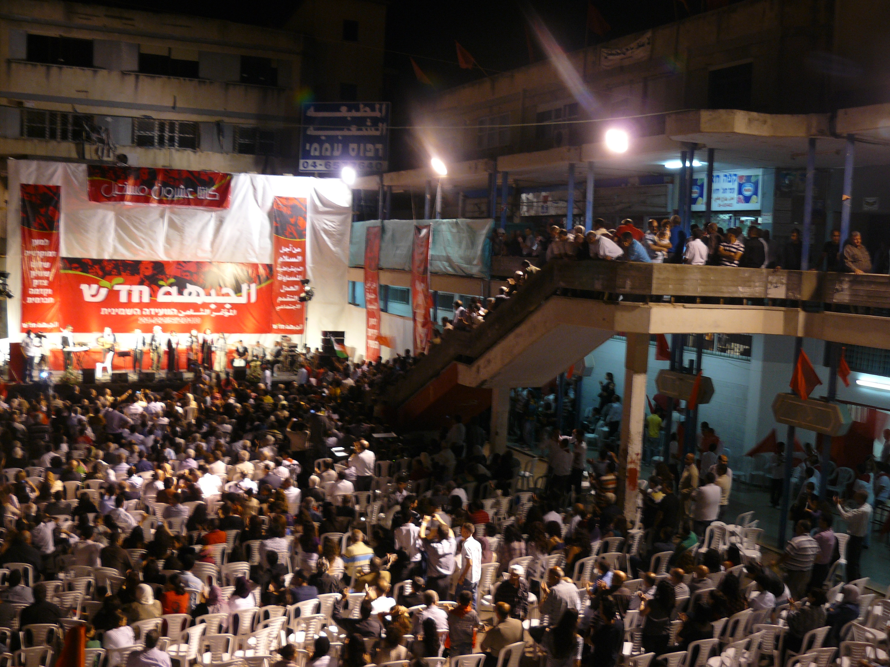 כנס הפתיחה של הועידה ה-8 של חד"ש